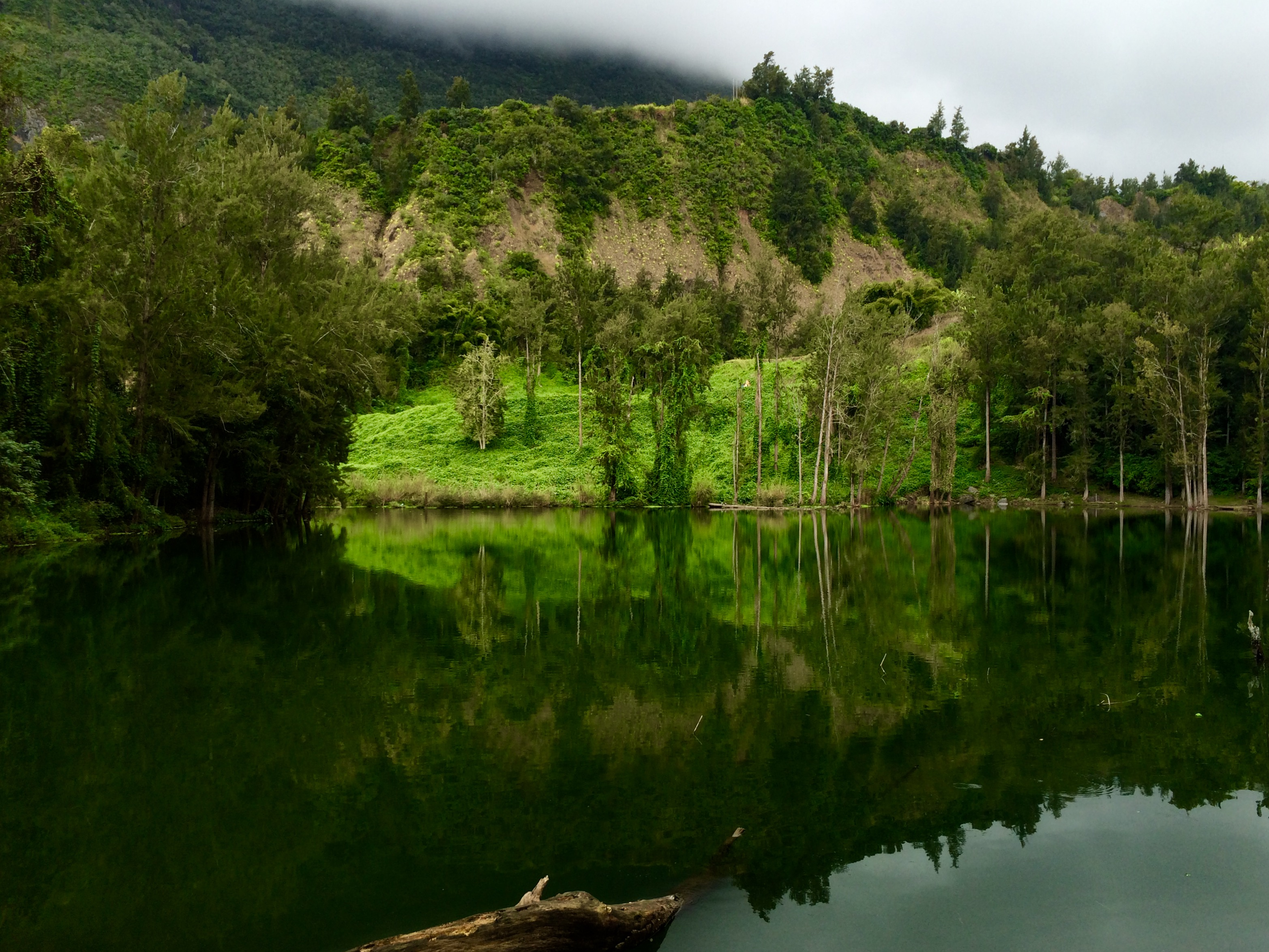 Mare à Poule d'Eau est un étang situé à dans le Cirque de Salazie. Isolé du vent, cet étang offre de superbes reflets à admirer ou à photographier.